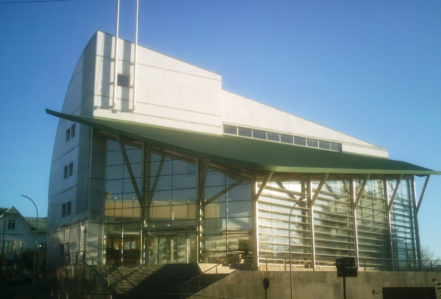 Corte de Apelaciones de Valdivia, calle Yungay, Valdivia, Chile